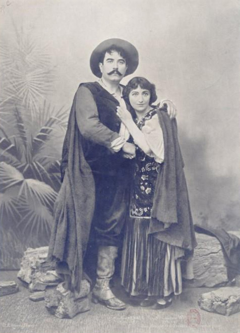 Mr Maurice Renaud (Rinaldo), Mlle Charlotte Wyns (Amica) dans Amica représentée aux Arènes de Nîmes : [impr. photomécanique] / L. Geisler sc [sig.] ; [d'après] Cl. R. Royer à Nîmes